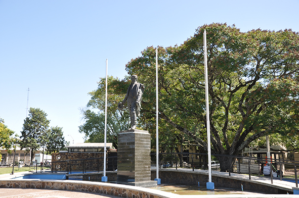 Plaza Principal